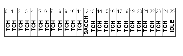 Mapping av logisk kanal på fysisk kanal for TCH kanalar i GSM-systemet